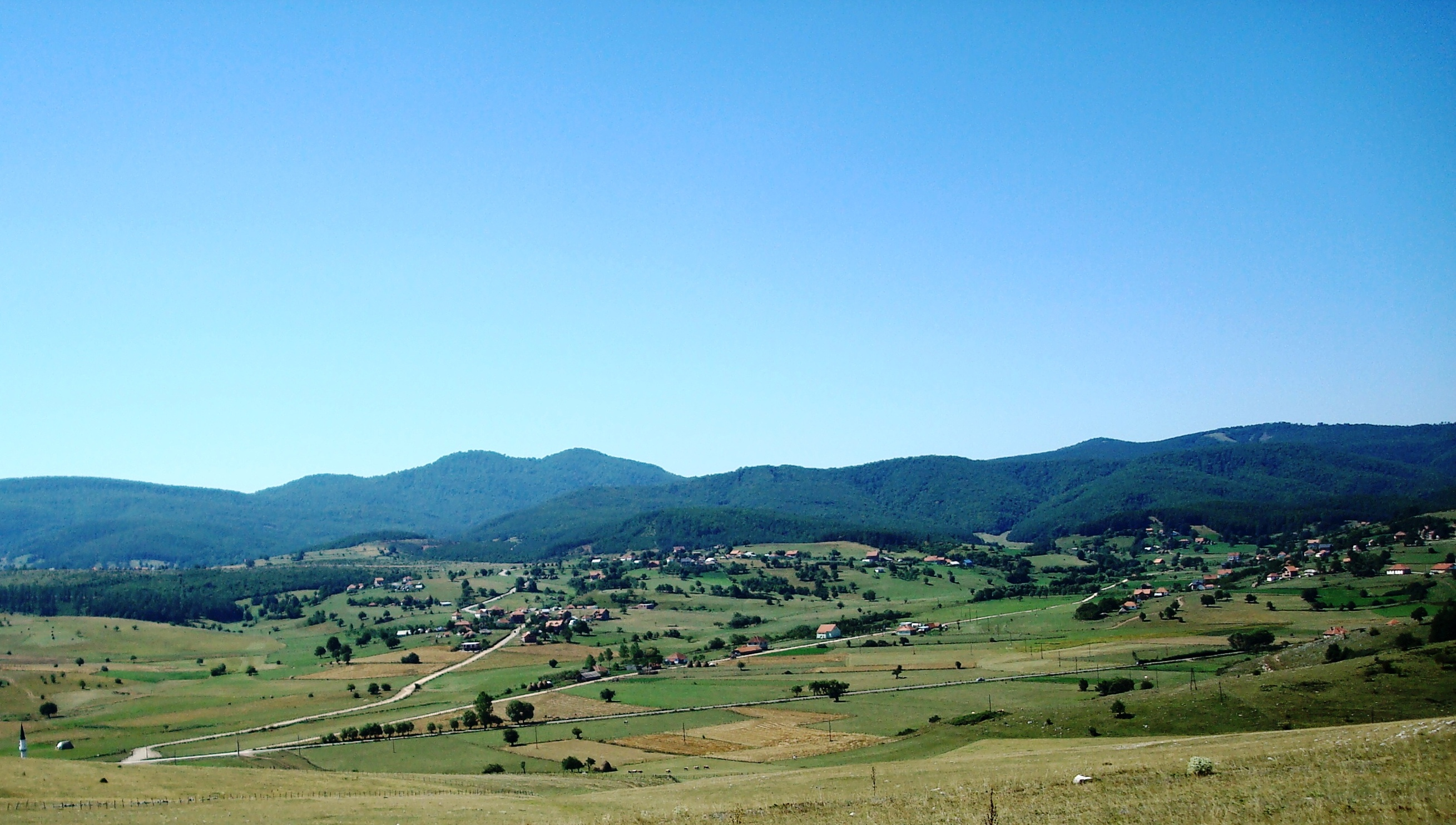 Снимио Рамиз Шаћировић и дозволио да се користи на Википедији без икаквих ограничења. --Радосав Стојановић (разговор) 13:26, 5. мај 2010. (CEST)